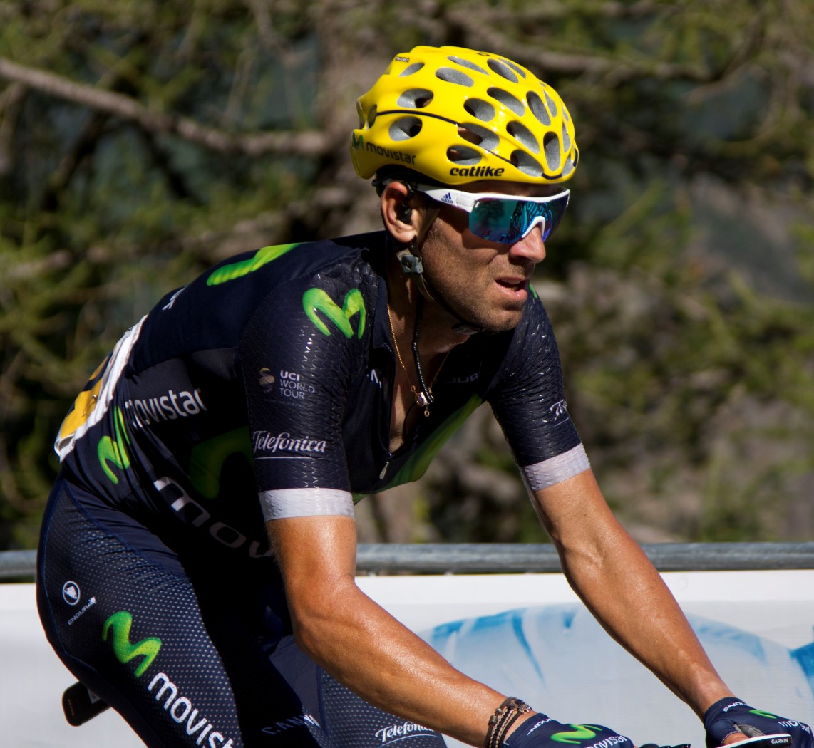 264 valverde